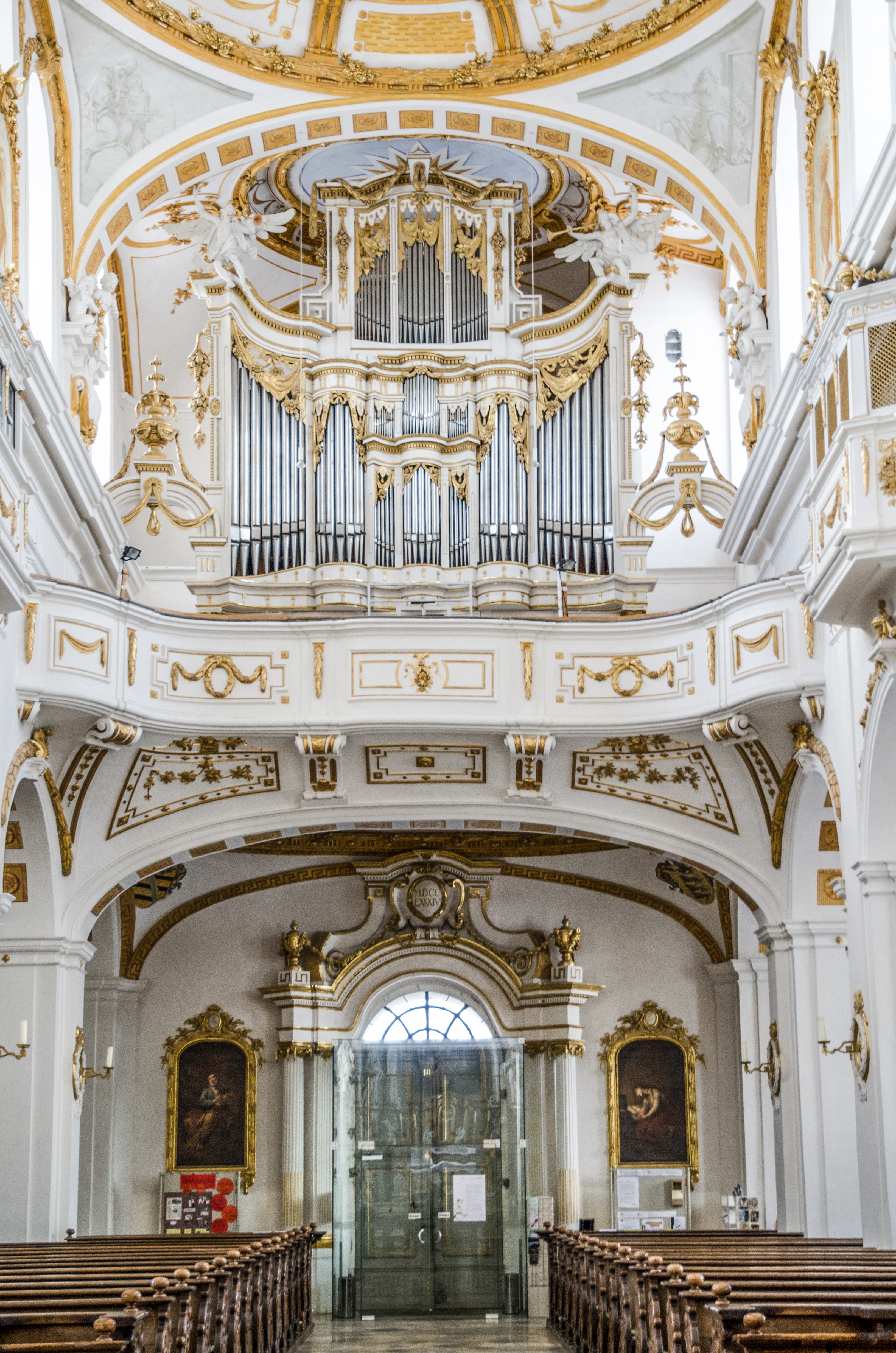 Elchingen, Klosterkirche St. Peter und Paul